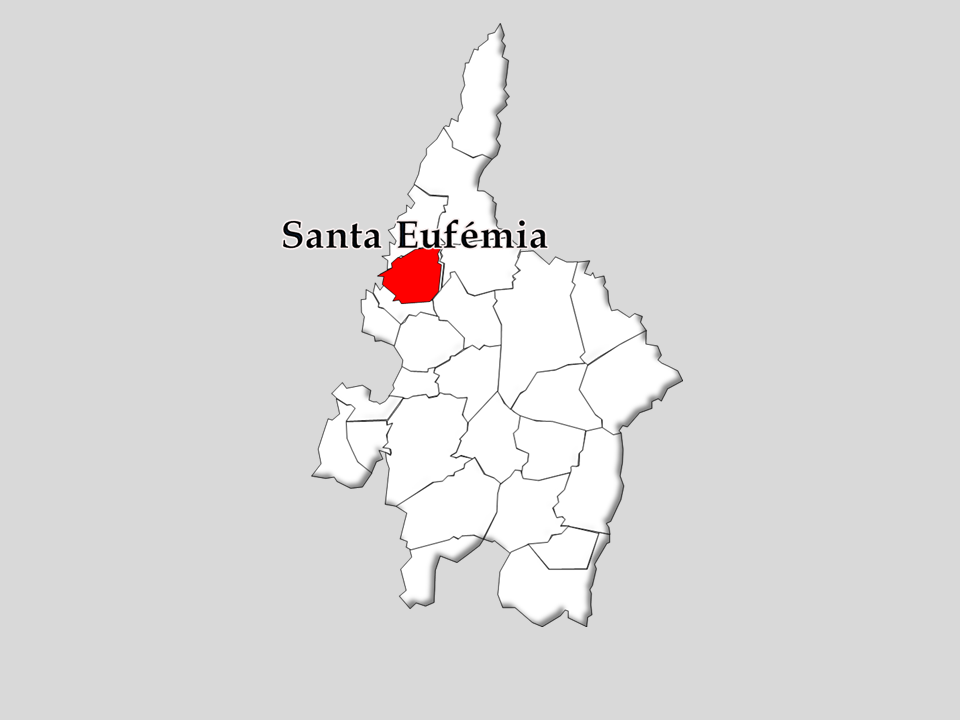 Censo 1864/2111